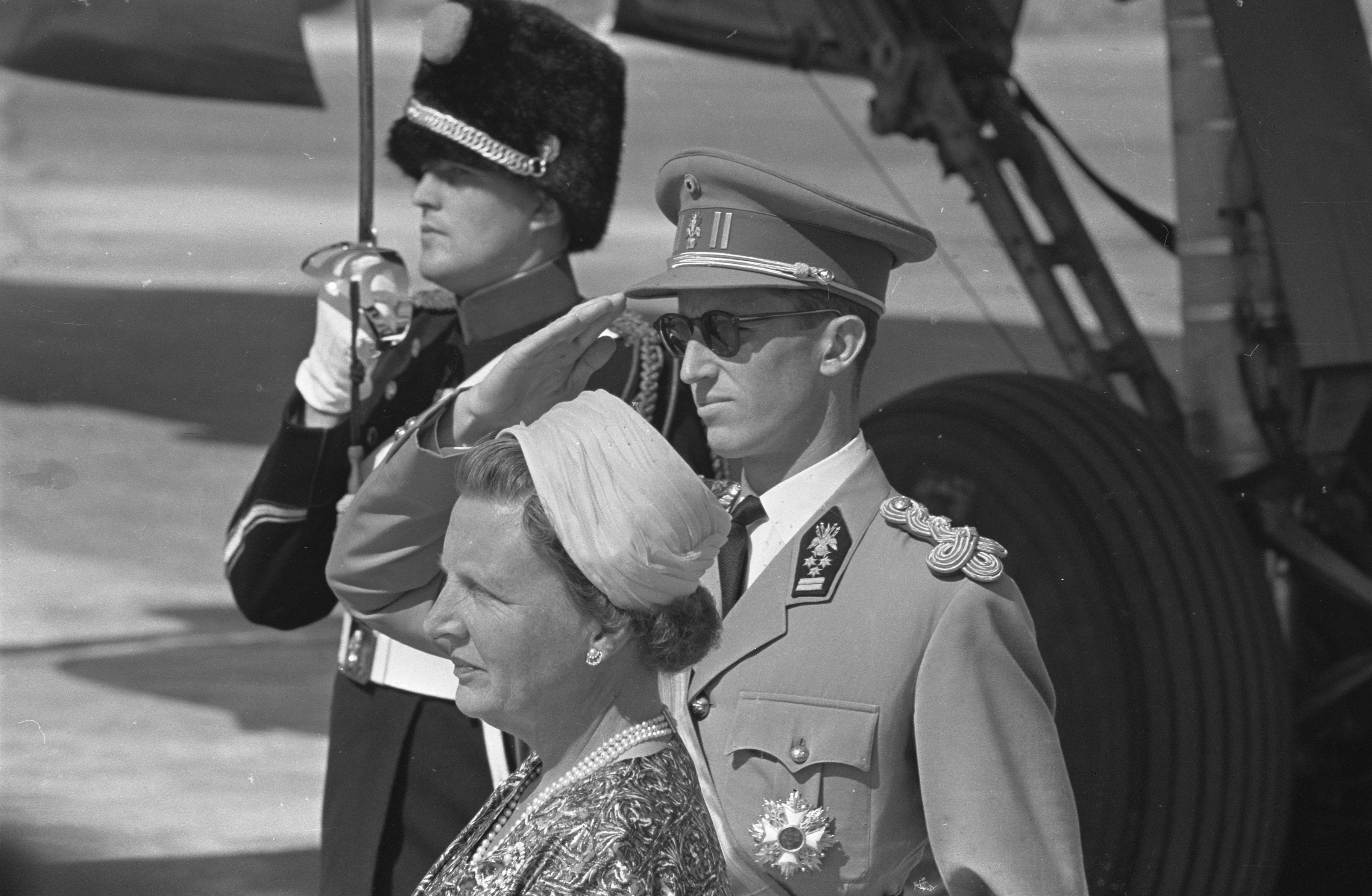 Collectie / Archief : Fotocollectie Anefo Reportage / Serie : Staatsbezoek koning Boudewijn 1959 Beschrijving : Staatsbezoek koning Boudewijn , aankomst op Schiphol Datum : 8 juli 1959 Locatie : Noord-Holland, Schiphol Trefwoorden : koninklijk huis, staatsbezoeken, vorsten Persoonsnaam : Bernhard, prins, Boudewijn, koning van België Fotograaf : Fotograaf Onbekend / Anefo Auteursrechthebbende : Nationaal Archief Materiaalsoort : Negatief (zwart/wit) Nummer archiefinventaris : bekijk toegang 2.24.01.05 Bestanddeelnummer : 910-5002